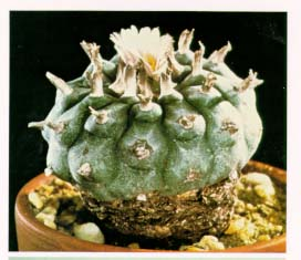 Peyote2